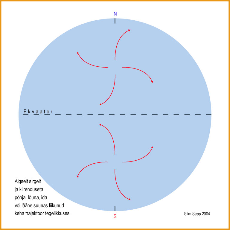 Coriolisi efekti mõju liikuvale kehale poolkerati